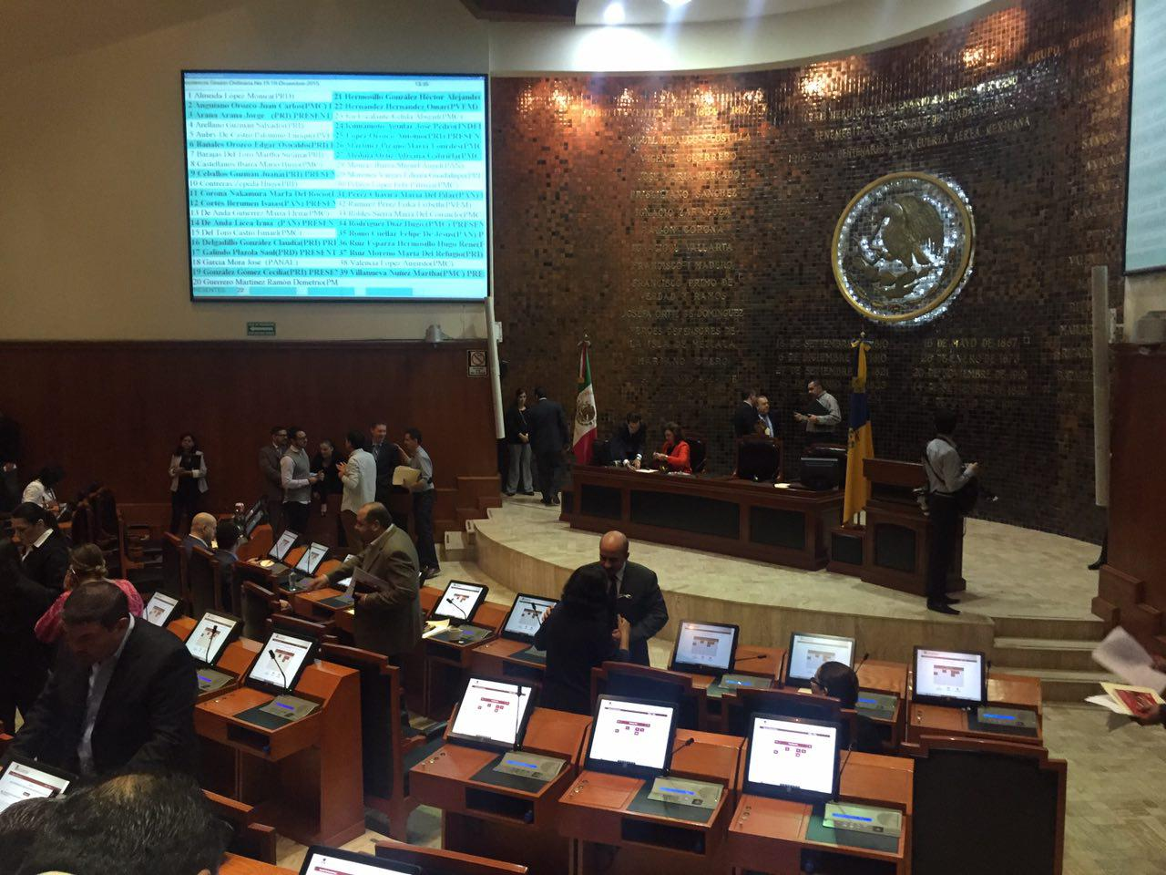 Salón del pleno del Congreso del Estado de Jalisco